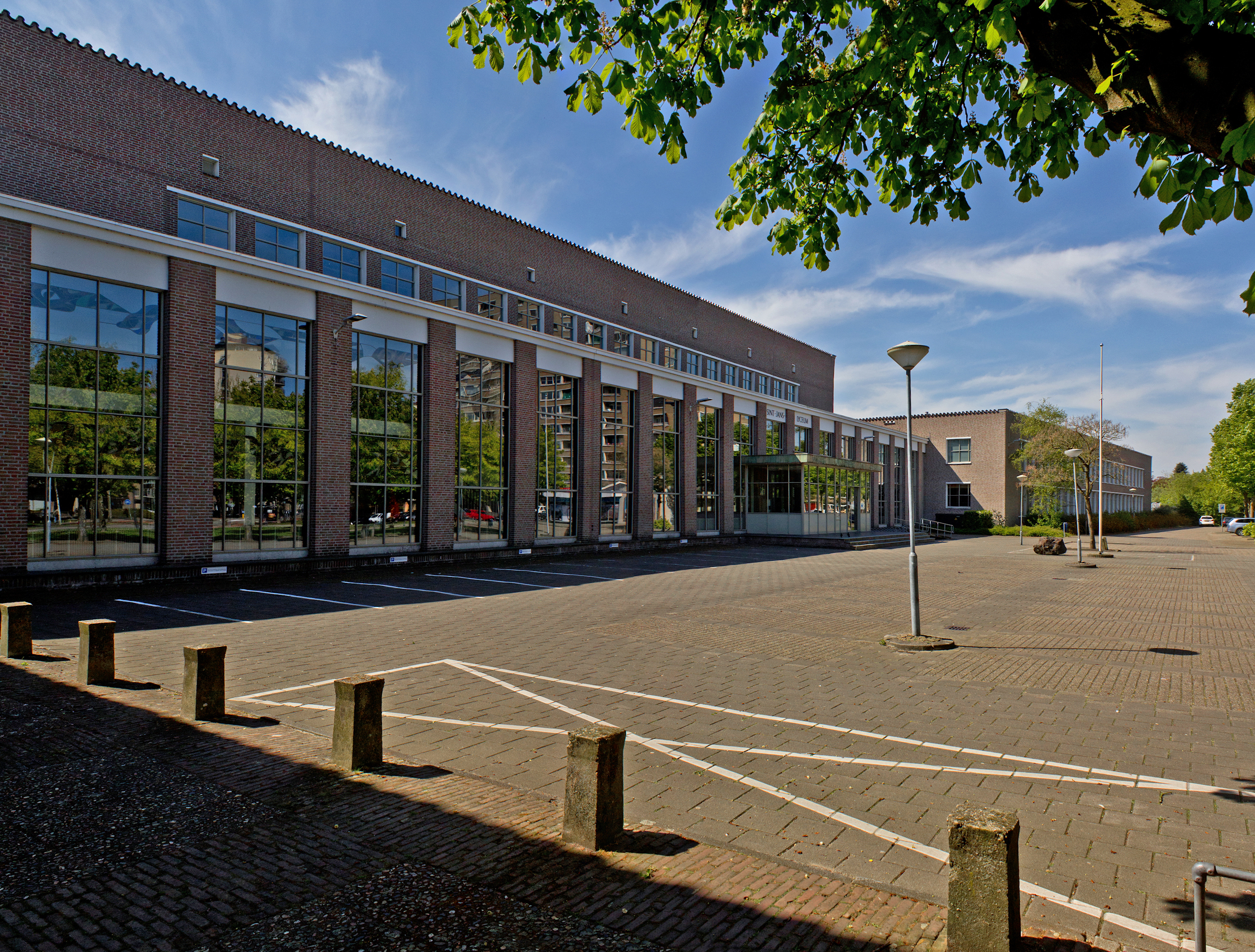 De voorzij de van het Sint Janslyceum. Architecten Nico van der Laan, Harry van Hal, Wim Hansen. 1959/61.